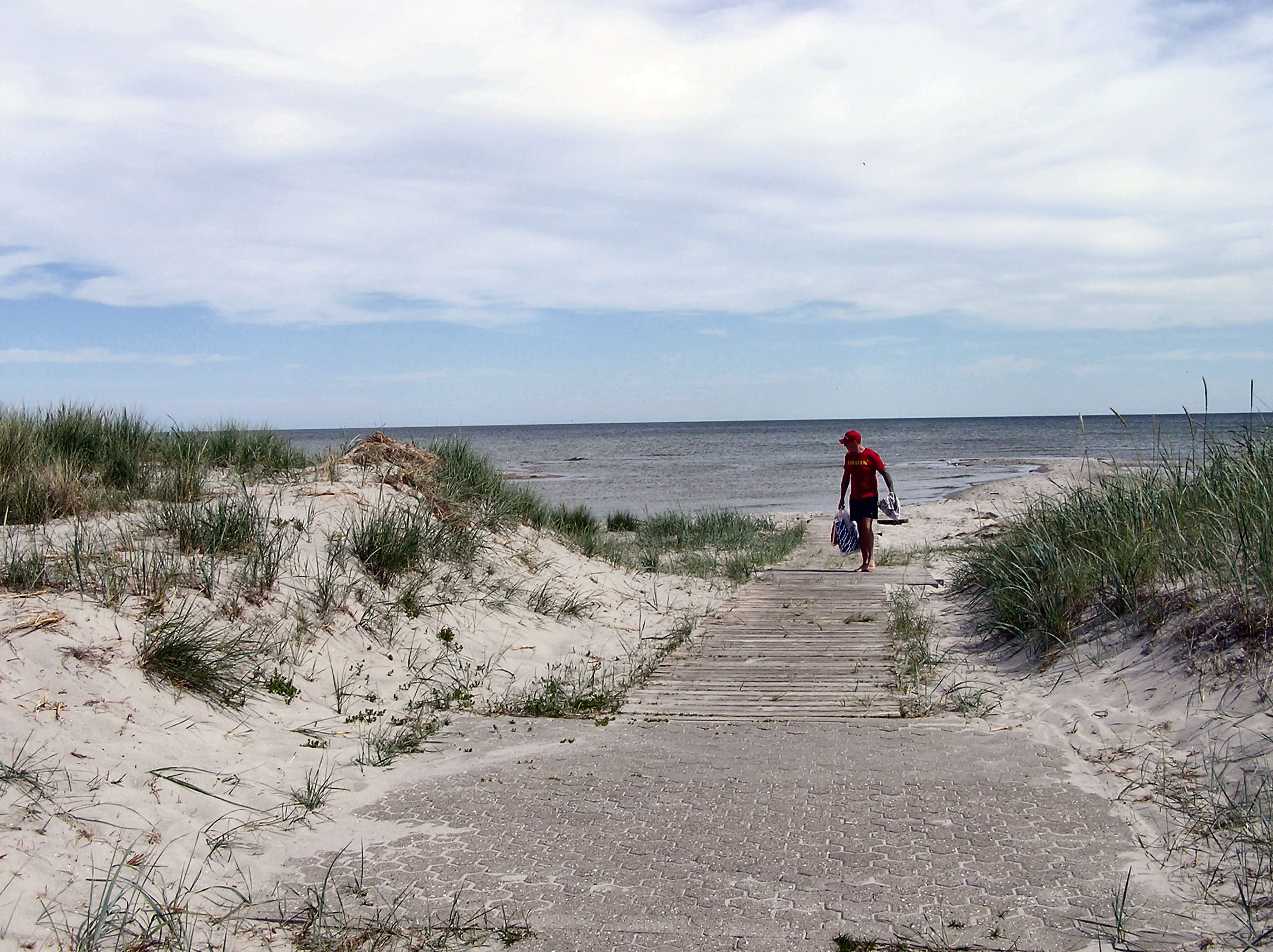 Hals, Denmark, beach